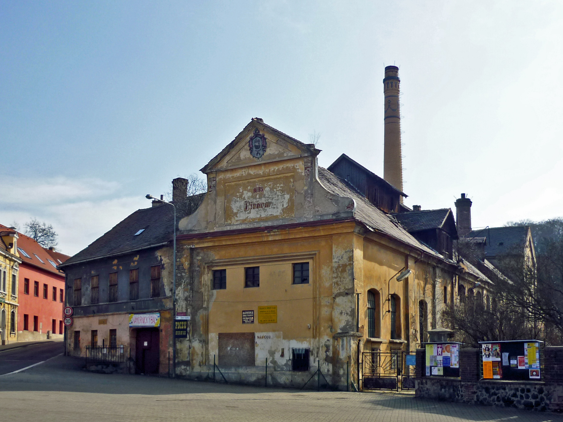 Alte Brauerei von Bilin (Bílina)